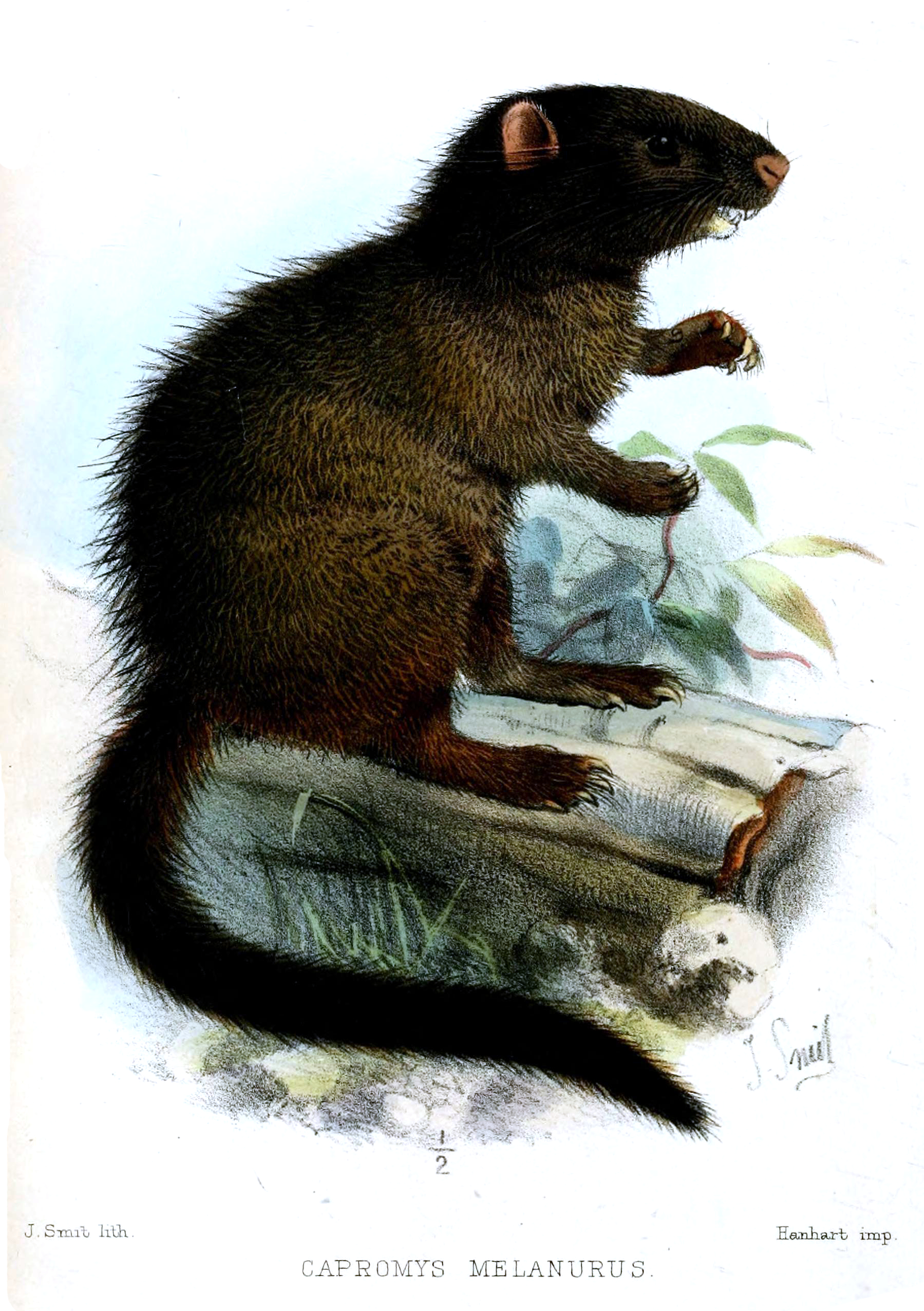 Capromys melanurus = Mysateles melanurus = Mesocapromys melanurus